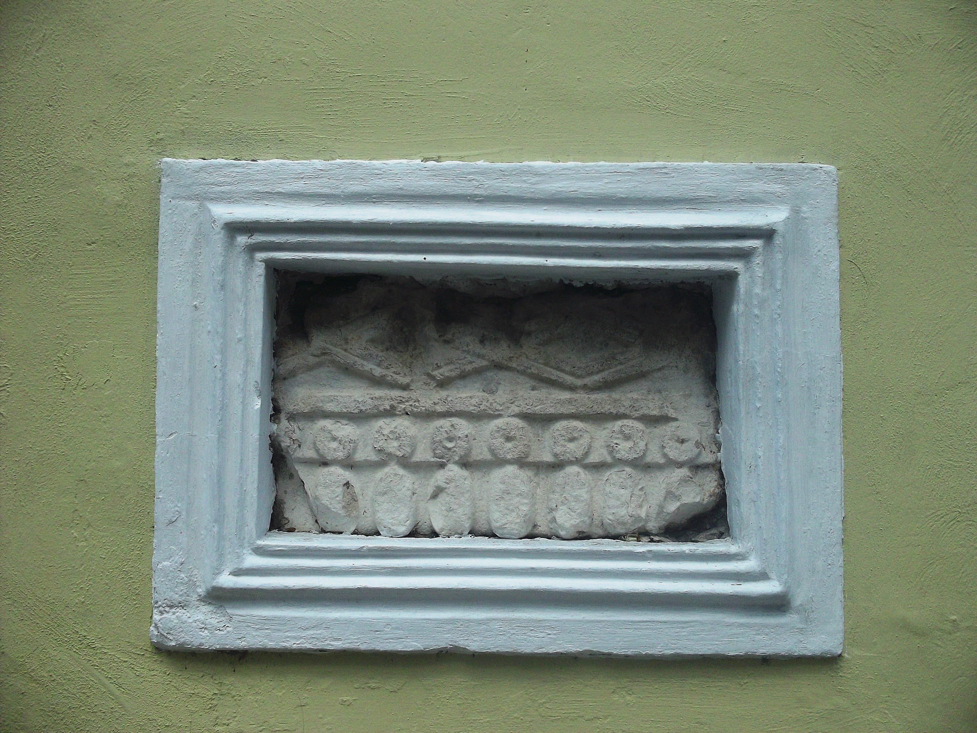 Fotografía de una piedra labrada perteneciente originalmente a algún edificio de las antiguas ruinas de la población de Thó. La pieza se encuentra expuesta al público en la pared de la Universidad Autónoma de Yucatán en calle 60 entre 59 y 57 de la ciudad de Mérida, Yucatán.